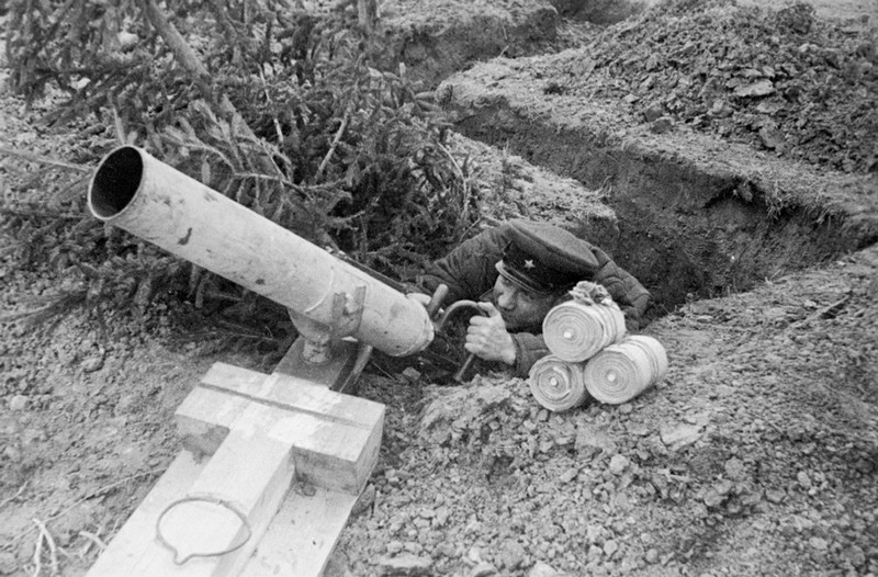 Использование ампуломёта для заброски агитационных листовок.